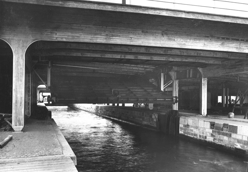 Karl Johansslussen med båda slussportarna öppna